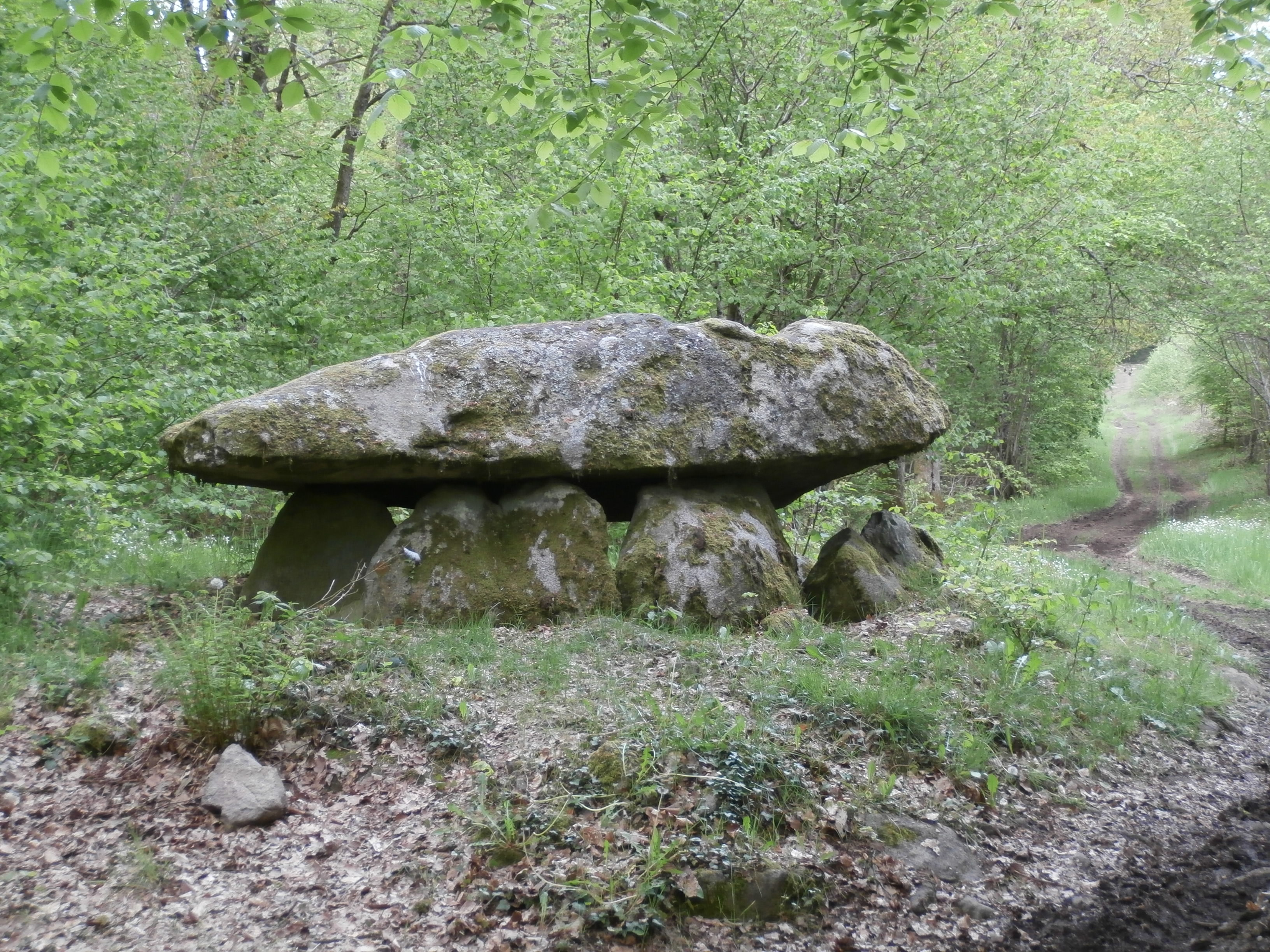 dolmen